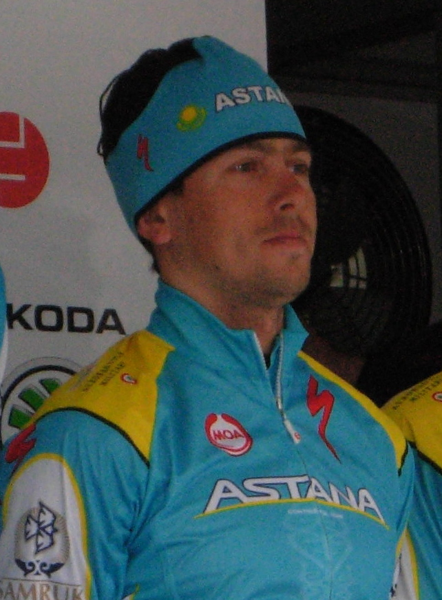 Tour de Bretagne 2013 - Présentation des équipes au départ de la deuxième étape à Ploemel - Équipe Astana Continental Depicted person: Yevgeniy Nepomnyachshiy